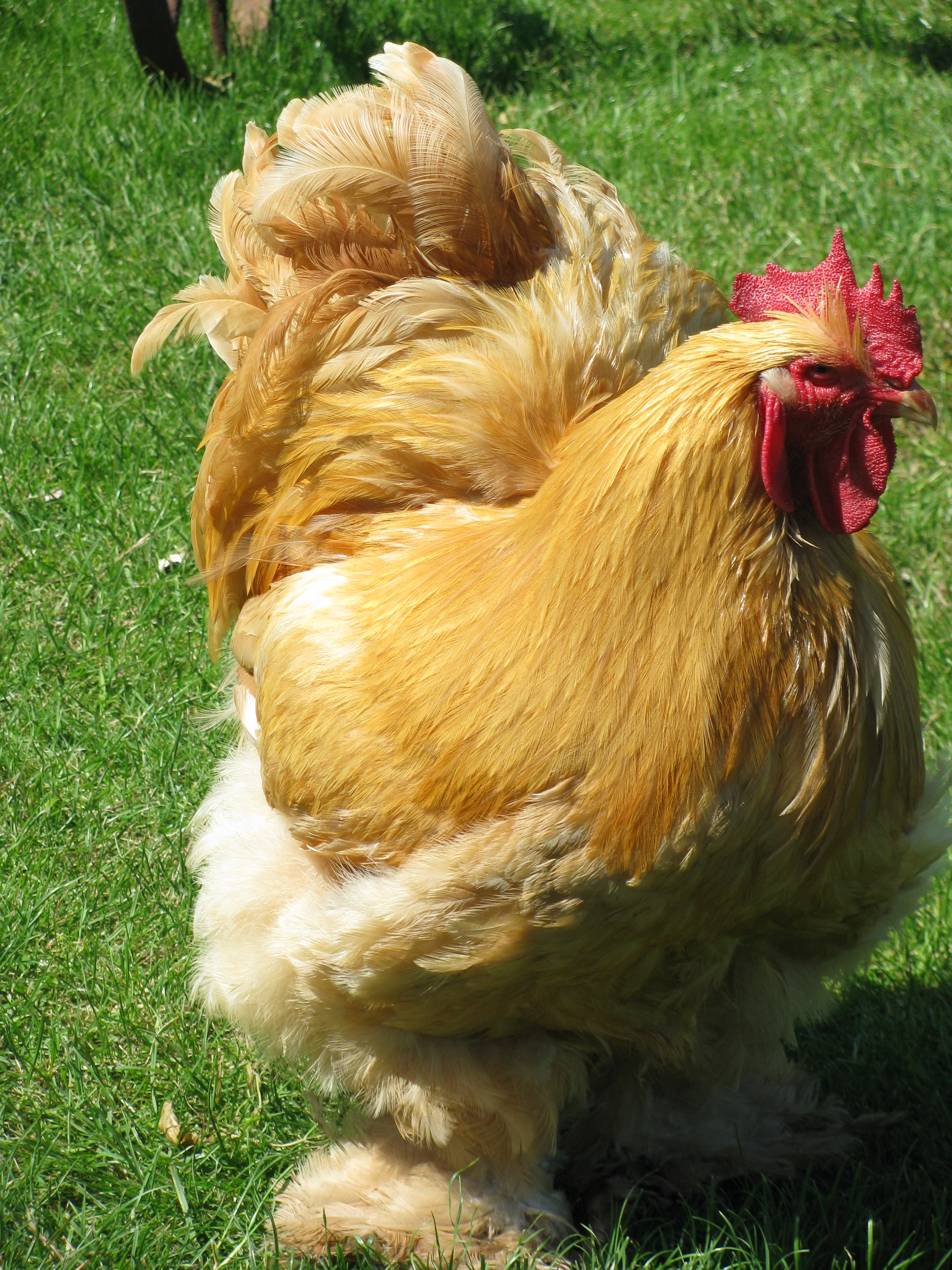 Cochin-Hahn, aufgenommen im Wissenschaftlichen Geflügelhof Sinsteden